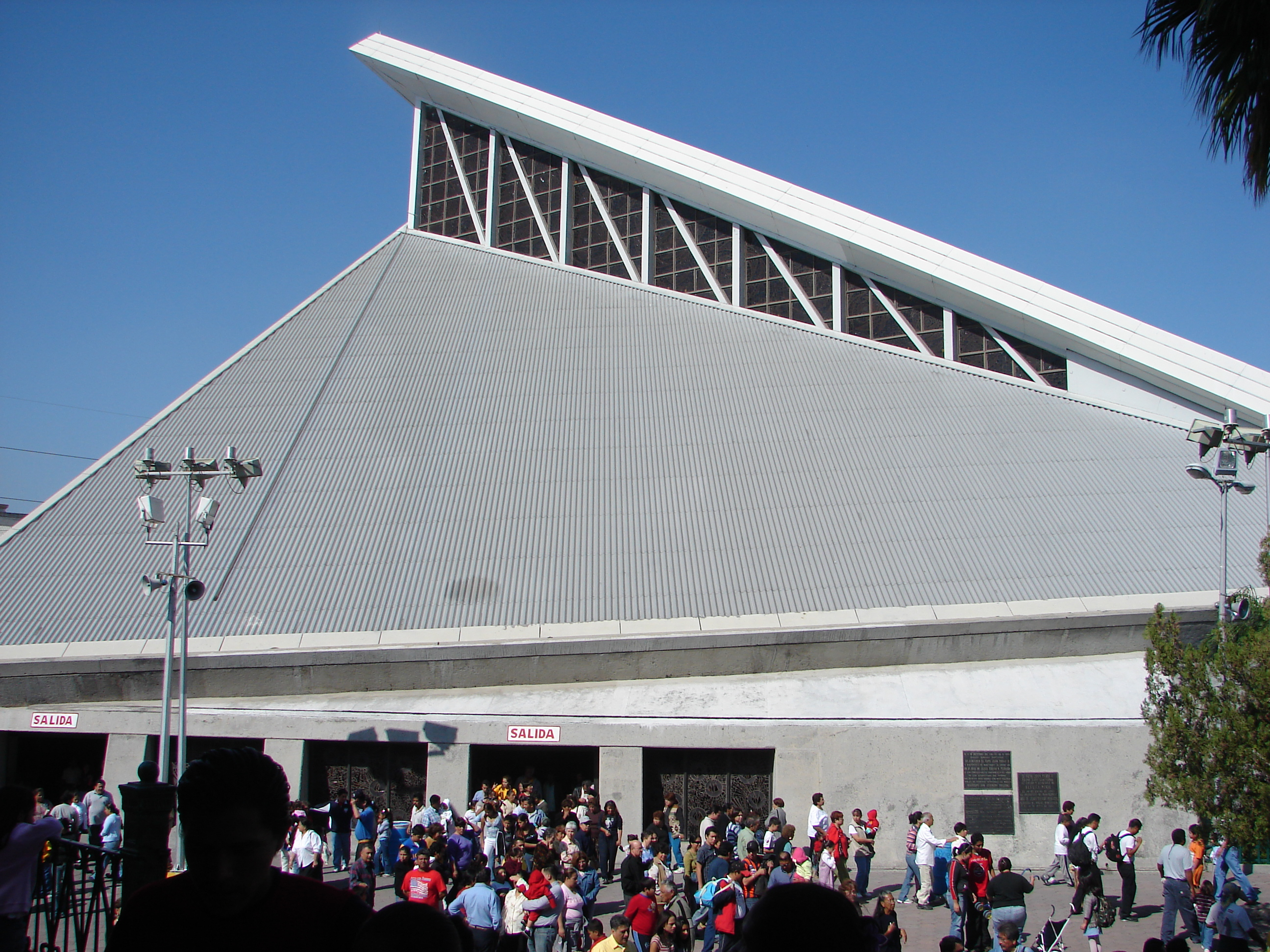 Basilica de Guadalupe/Basilica of Our Lady of Guadalupe, in Monterrey, Nuevo Leon, Mexico